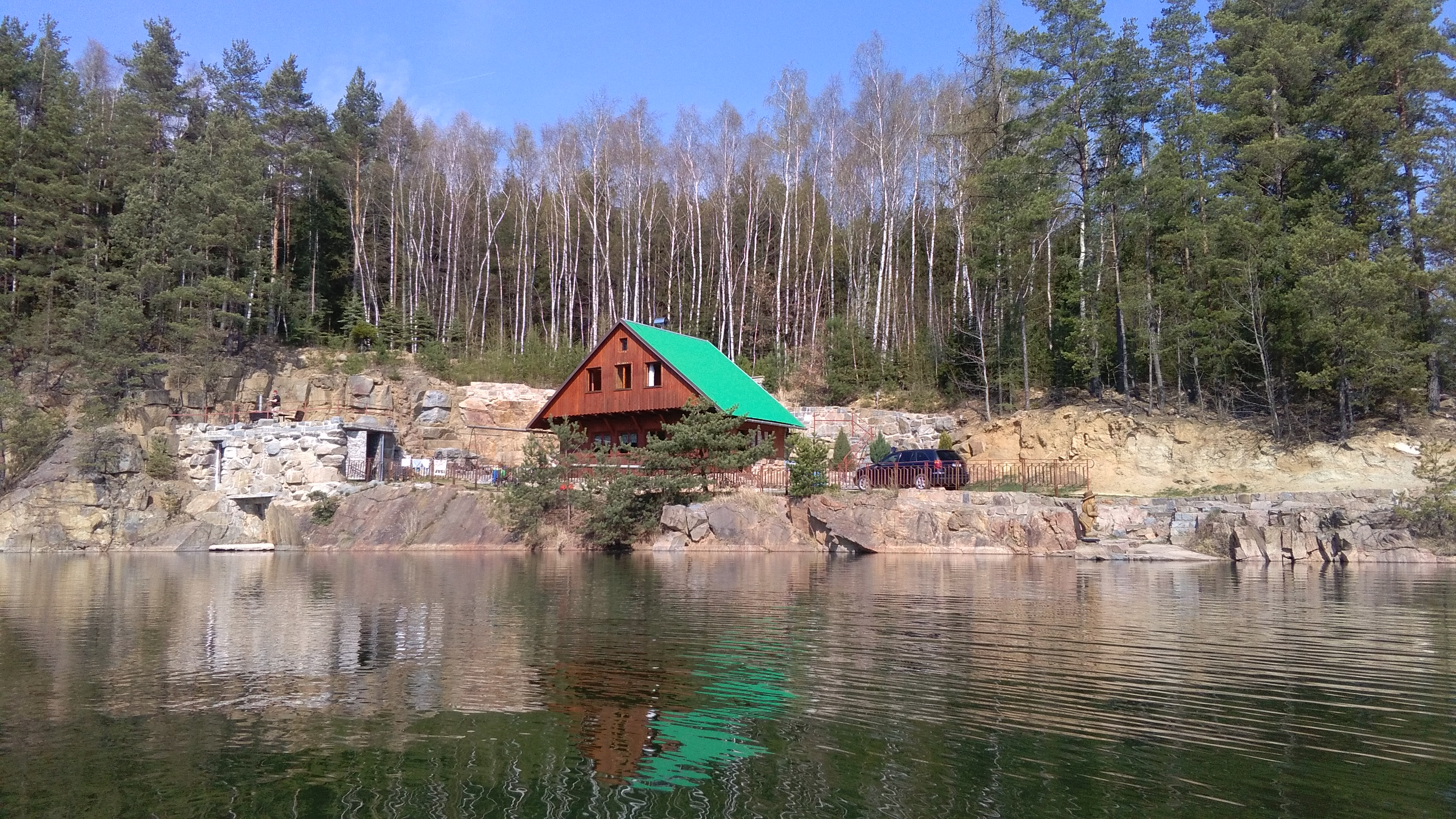 lom Hluboká